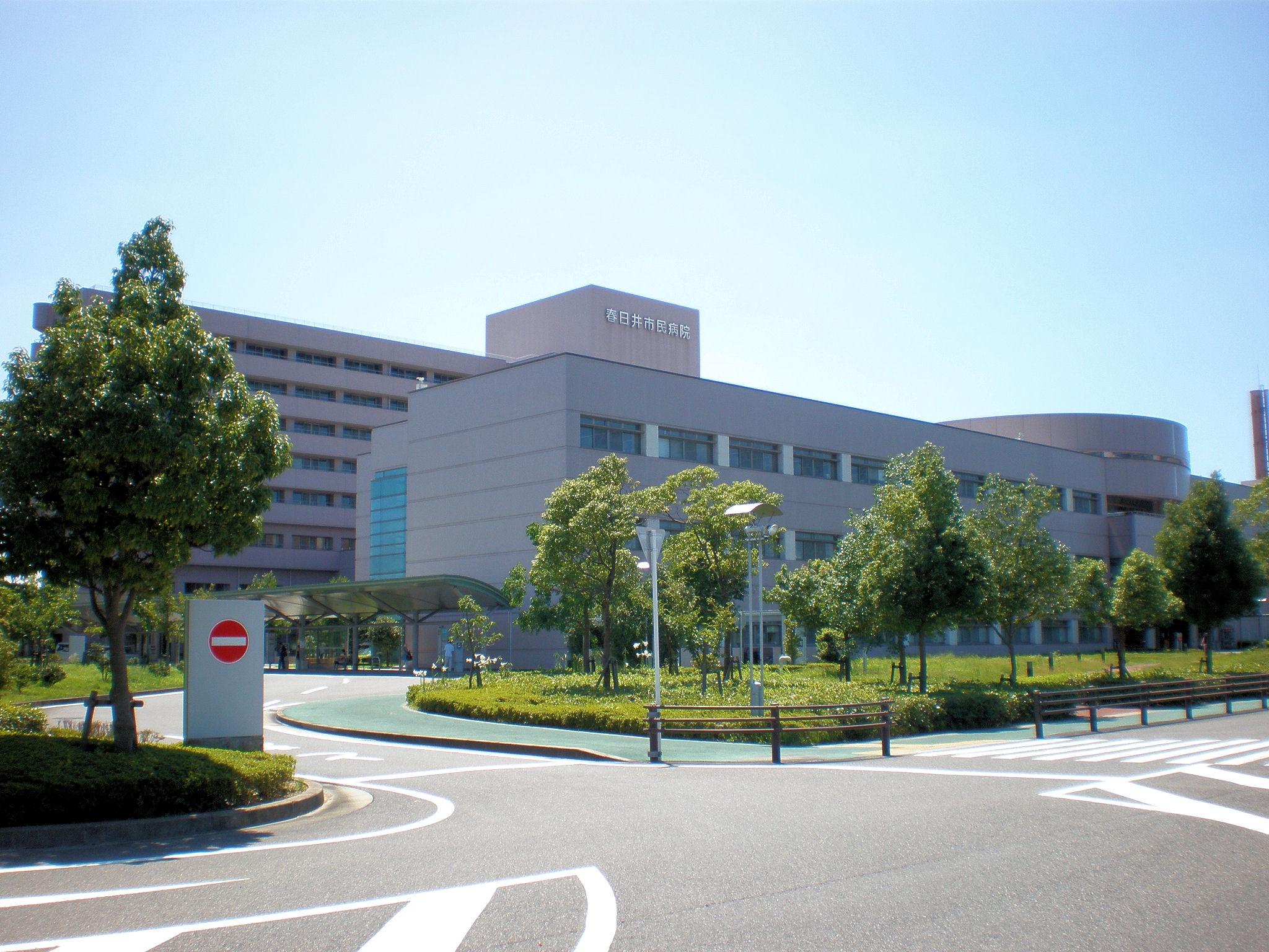 愛知県春日井市にある春日井市民病院